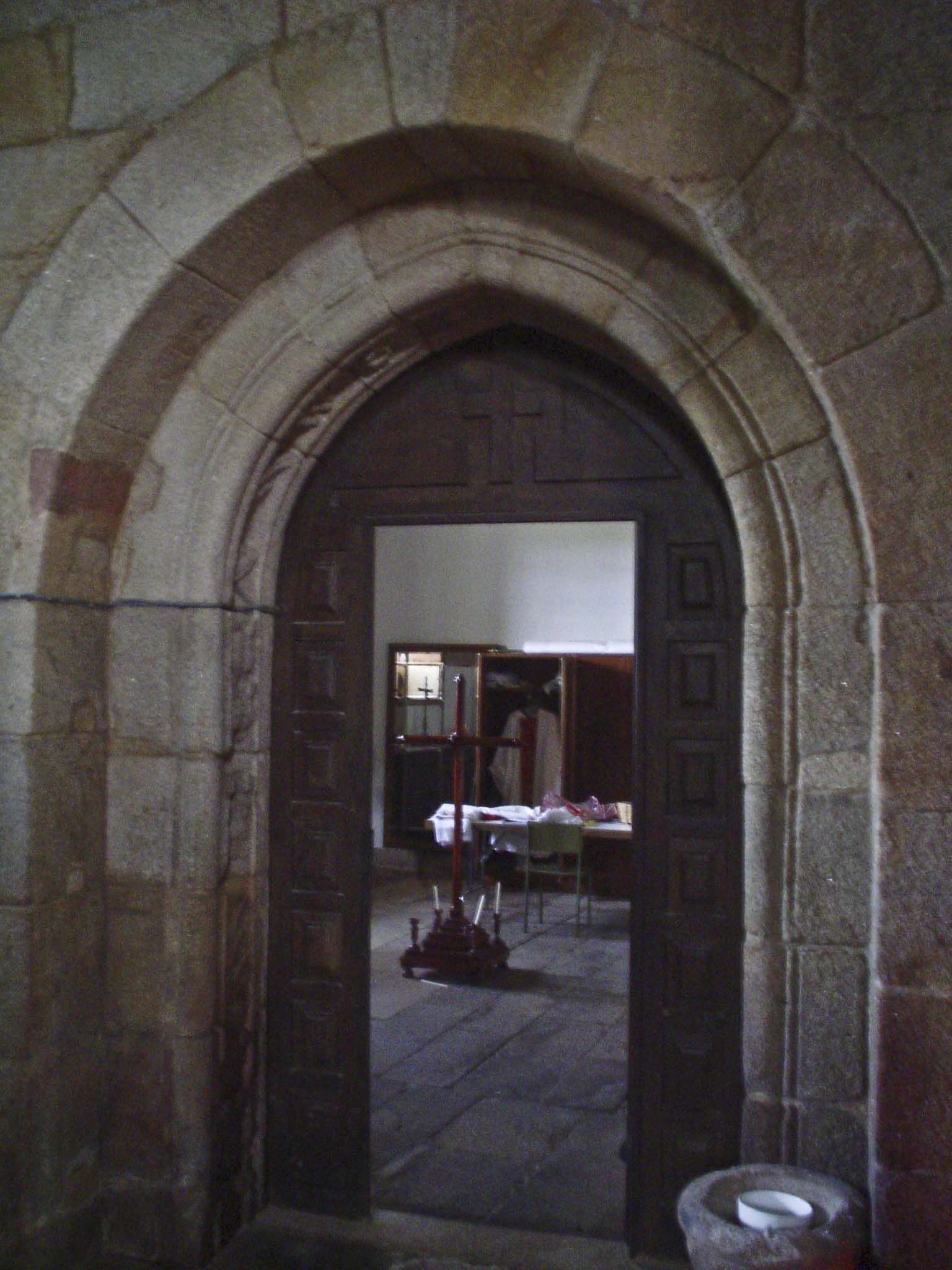 Porta de acceso a sancristía da igrexa do Mosteiro de Aciveiro